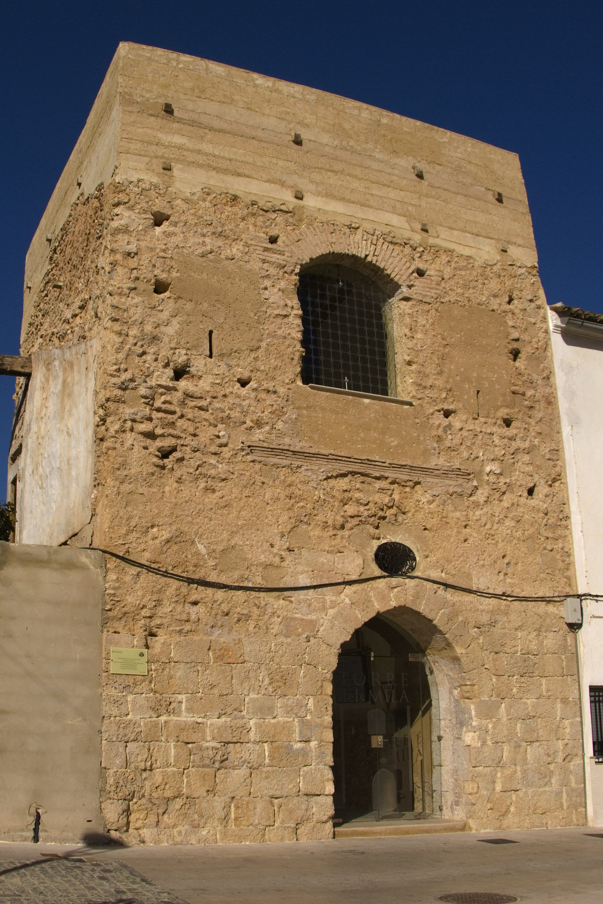 Torre de Massalavés, municipi del País Valencià, situat a la comarca de la Ribera Alta. Aquesta imatge ha sigut publicada en: País Valencià poble a poble, Massalavés, 30-06-2017